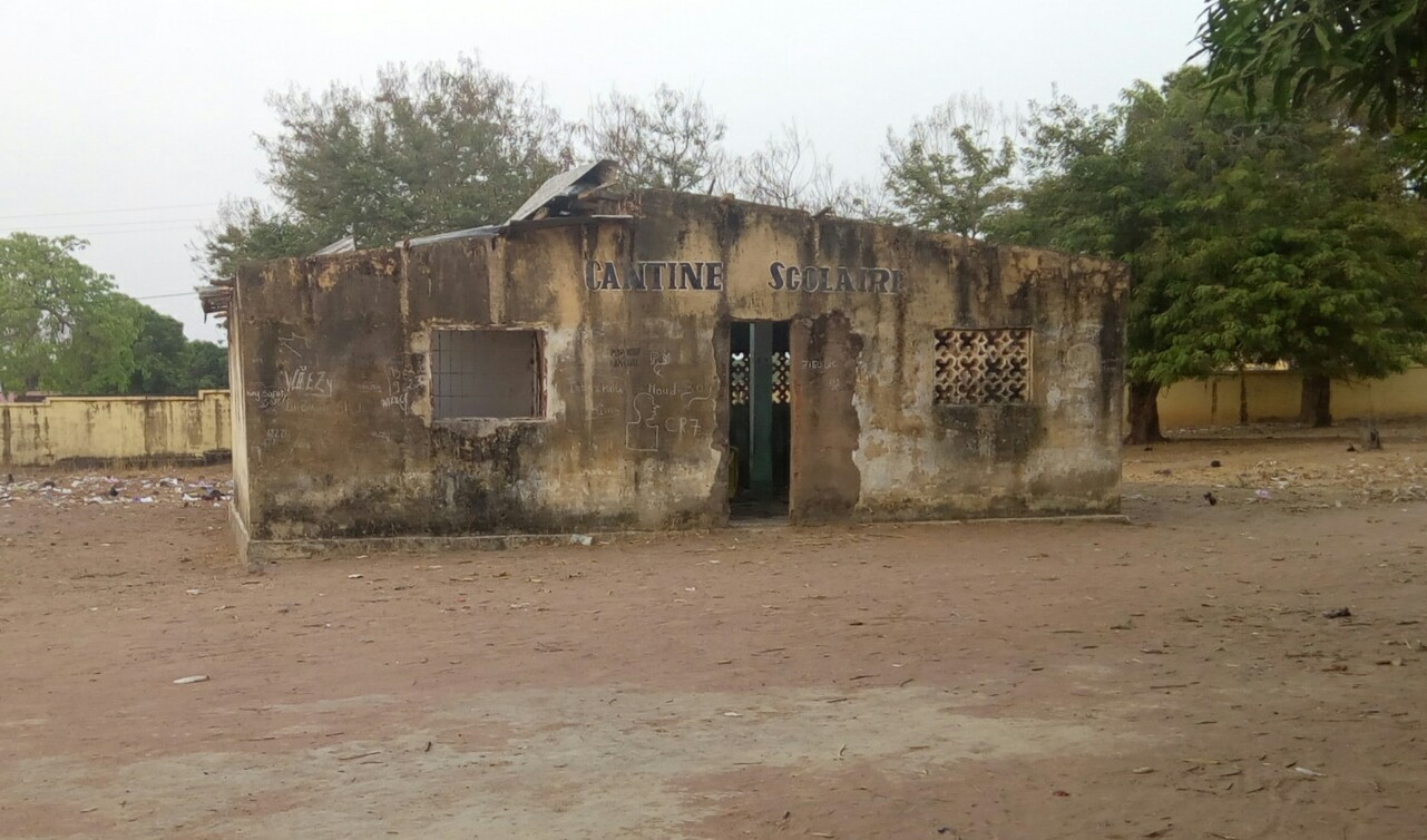 Cette image montre la précarité des infrastructures scolaires de la préfecture de Koundara. Cette cantine est le symbole du manque crucial